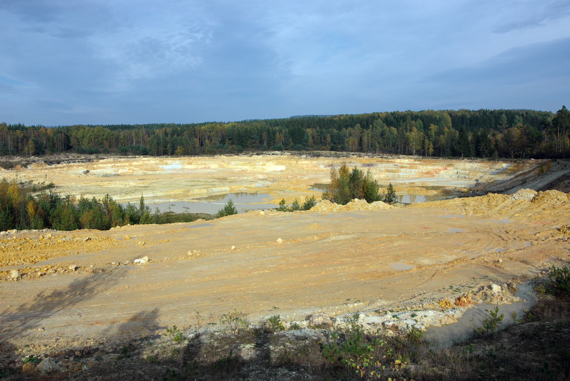 Vackov, část města Plesná, těžba keramických jílů, okres Cheb